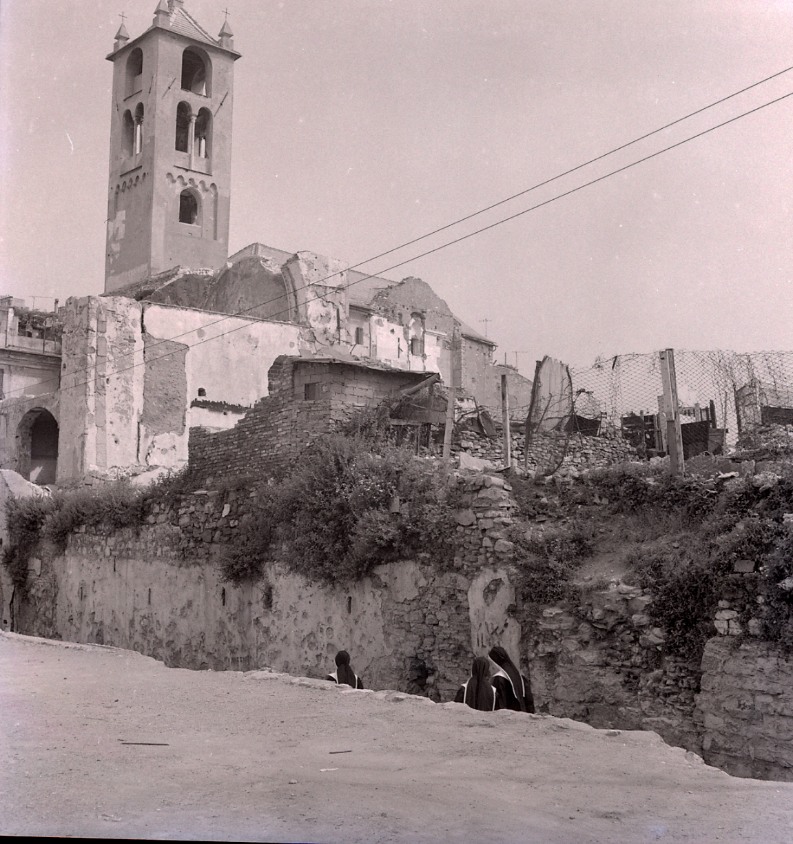 La chiesa di Santa Maria in Passione (Genova), in rovina in seguito ai bombardamenti della seconda guerra mondiale. Serie fotografica : Genova, 1965 / Paolo Monti. - Buste: 12, Fototipi: 12 : Negativo b/n, gelatina bromuro d'argento/ pellicola ; 6x6. - ((Serie costituita da 12 negativi identificati con i nn.: 8862-8873. Numerazione parallela: 71-82. Sulla busta R8862 manoscritto: "Rovine". La suddetta serie è contenuta nella scatola identificata con la numerazione R8801/9173. Sul coperchio iscrizione manoscritta a pennarello: "Genova".